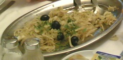 Bacalhau à Brás, um prato português. Bacalhau à Brás, a portuguese cod fish dish.